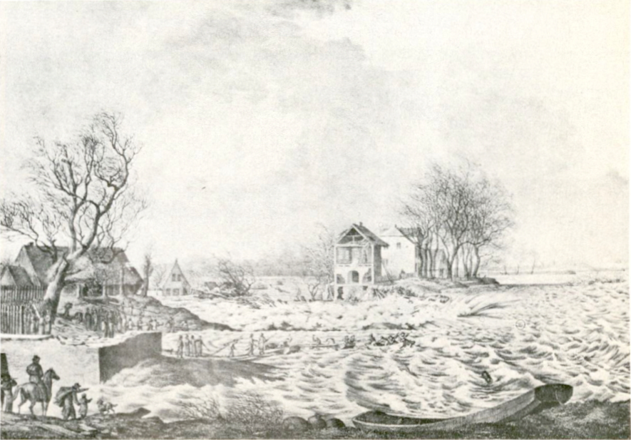 Rupture of the Eisenradsdeich in Bremen on 1827-03-06